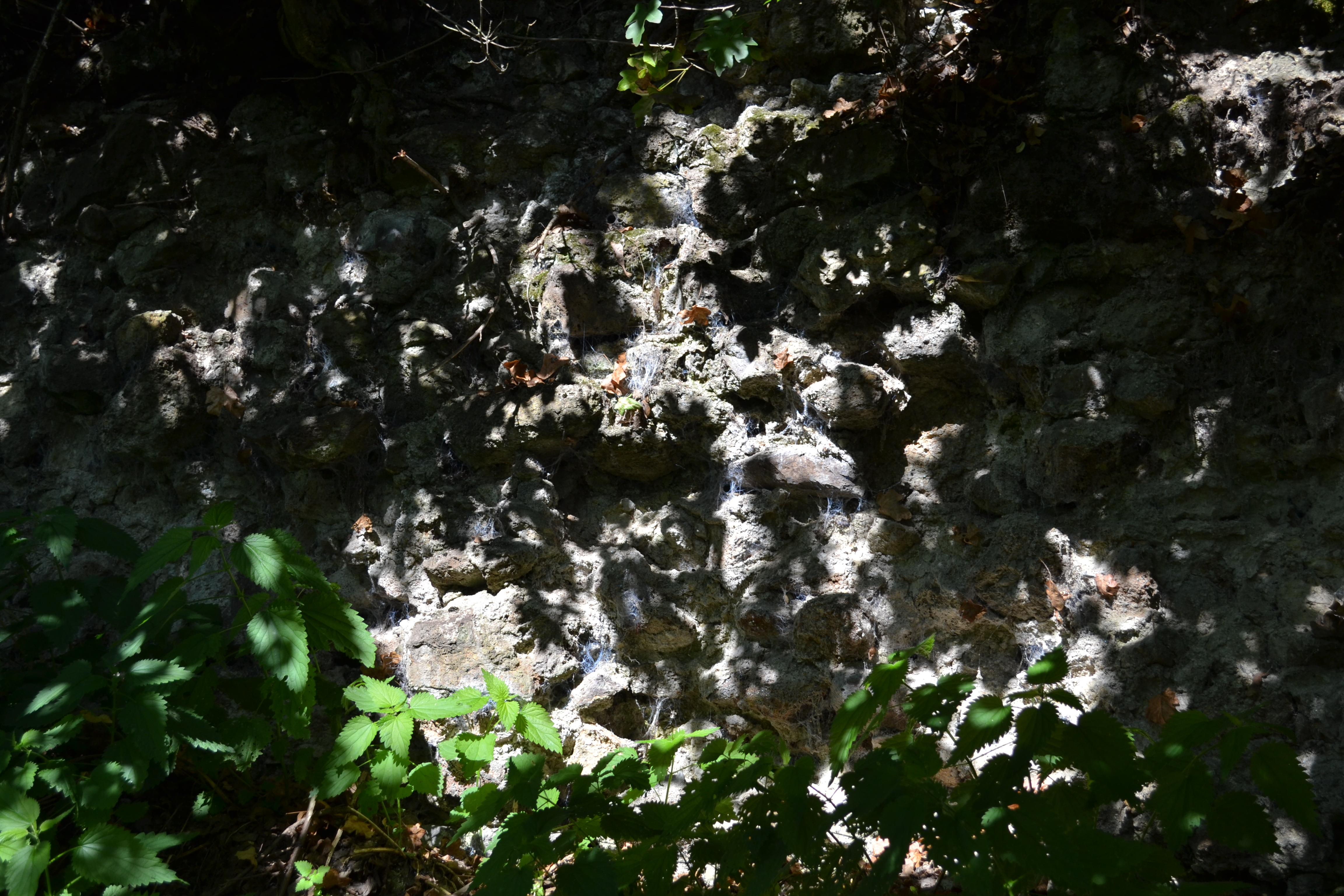 Hodejovský hrad, v hustom poraste je viditeľný pozostatok hradného múra